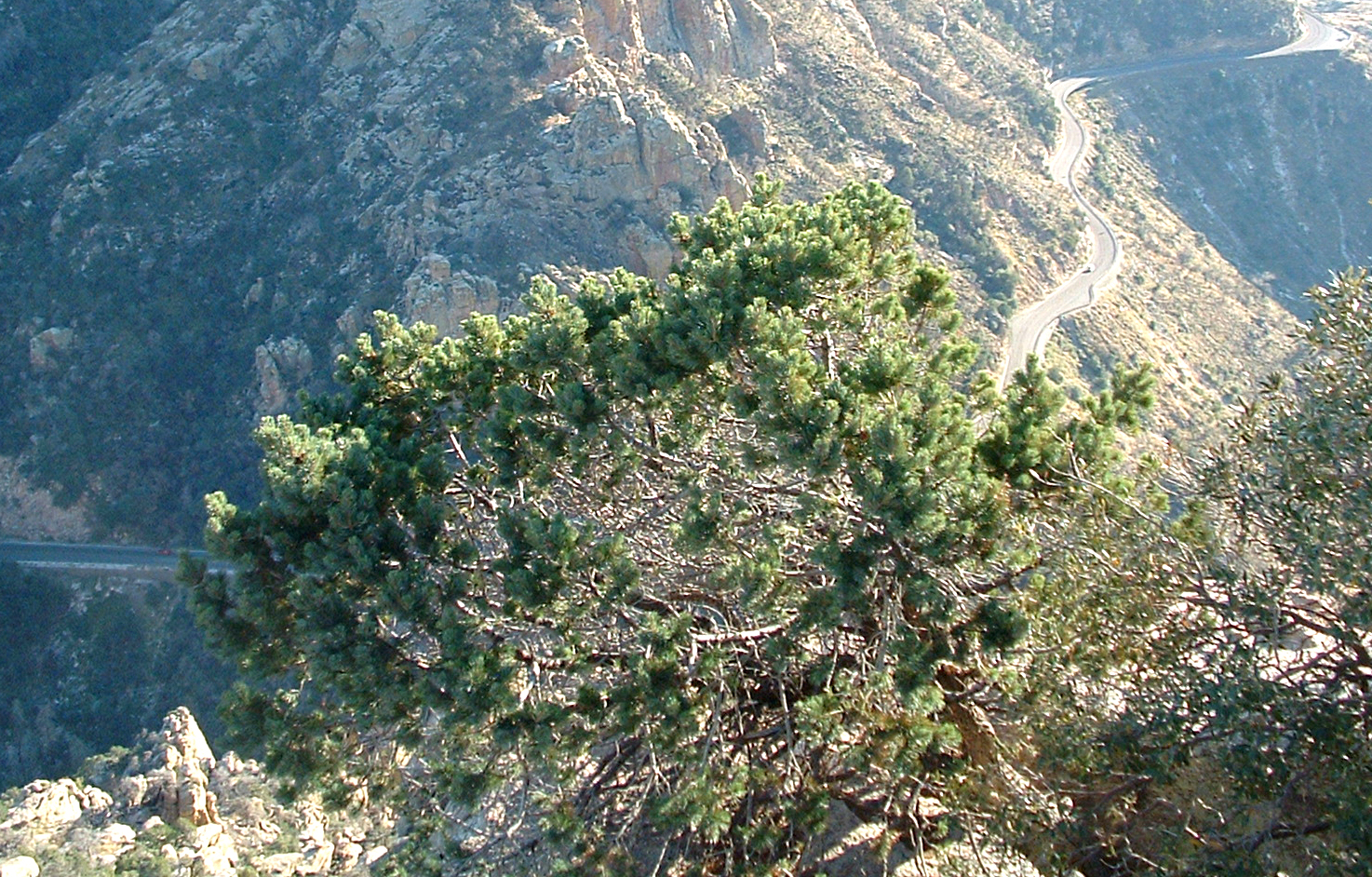 Pinus discolor, Santa Catalina Mountains, Tucson, Arizona.